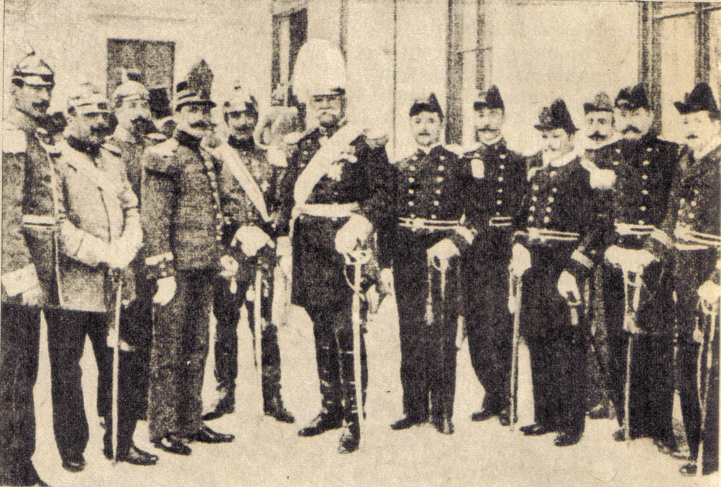 Emil Körner Henze (* Halle an der Saale, Prusia, 1846 - † Berlín, Alemania, 25 de marzo de 1920). Militar Alemán. Heredero de una larga tradición militar prusiana, fue Comandante del Ejército de Chile con el grado de Inspector General desde 1900 a 1910. En la fotografía, al centro junto a oficiales del Ejército de Chile